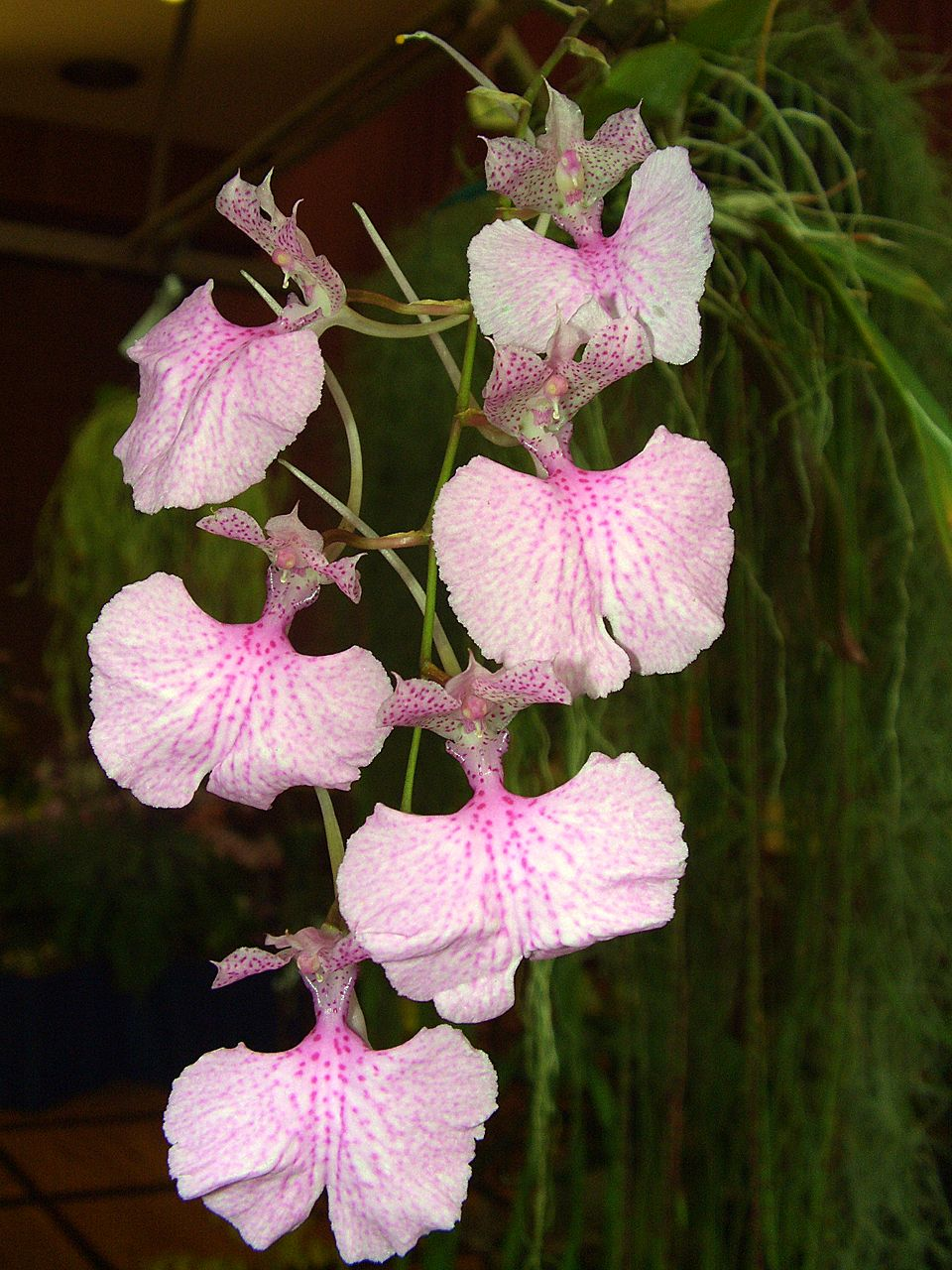 Comparettia macroplectron